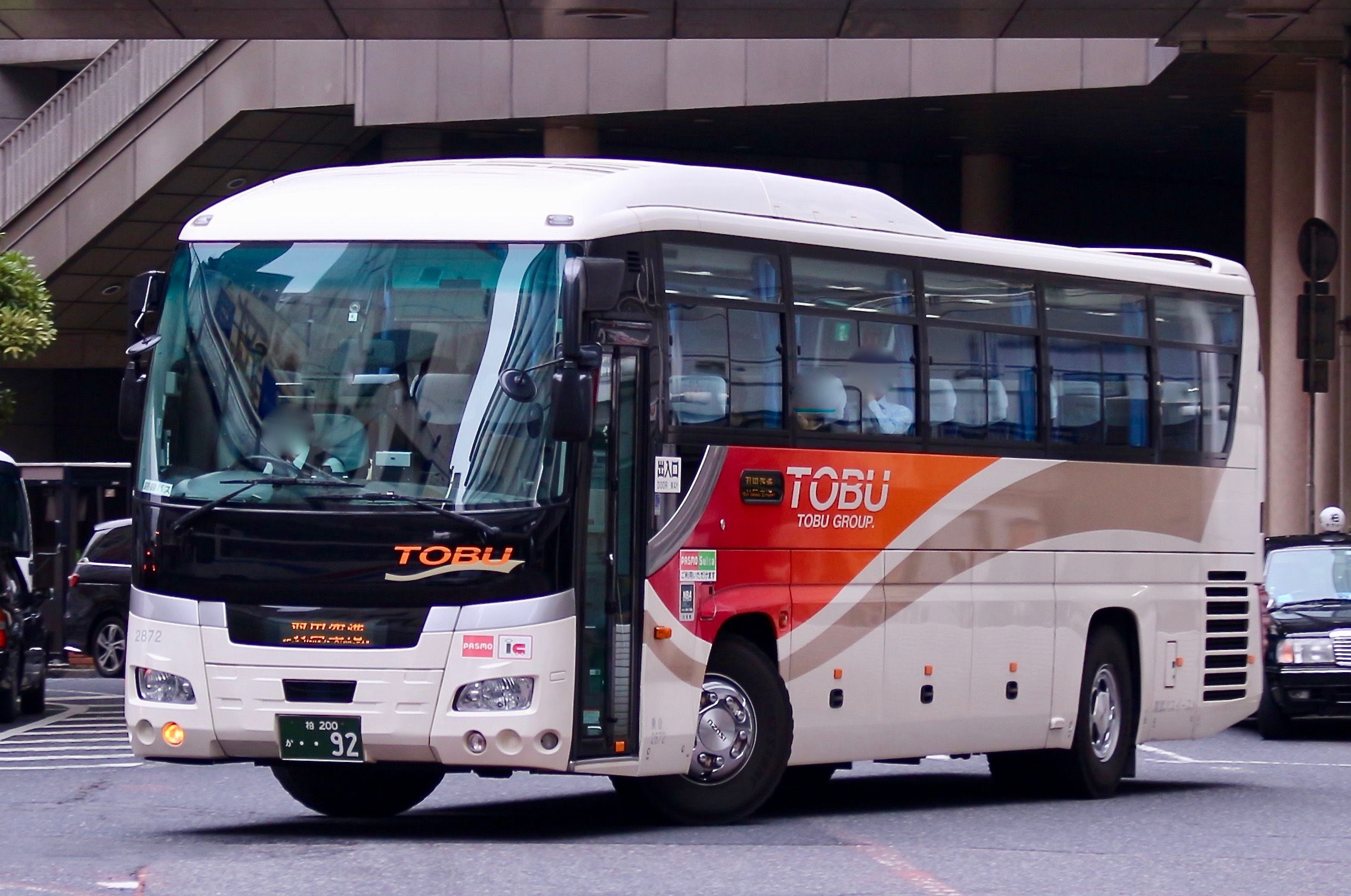 東武バスイースト西柏営業事務所 社2872 いすゞガーラHD 柏駅西口付近 2018年6月15日